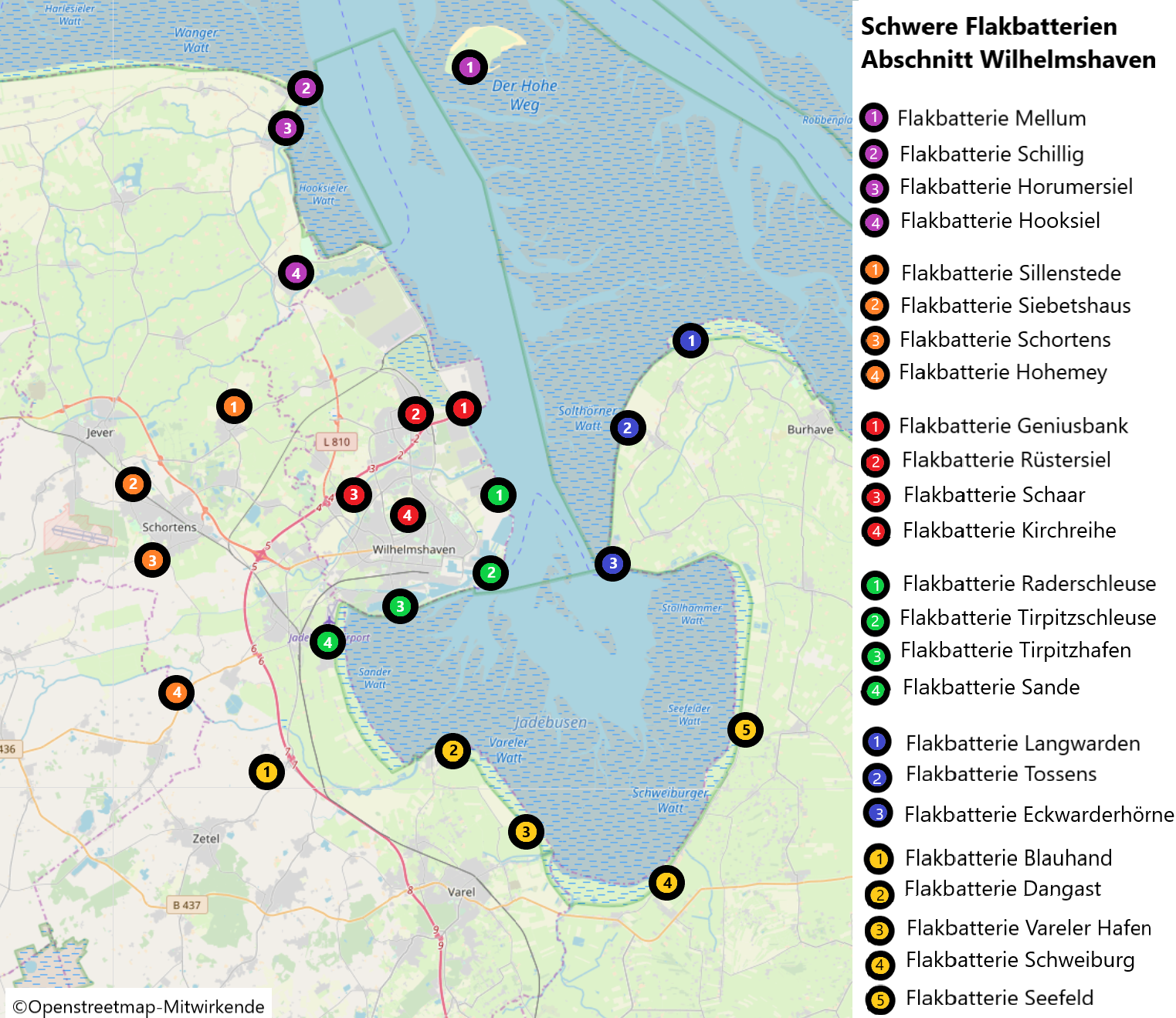 Überarbeitete Karte der Flakbatterien Wilhelmshaven